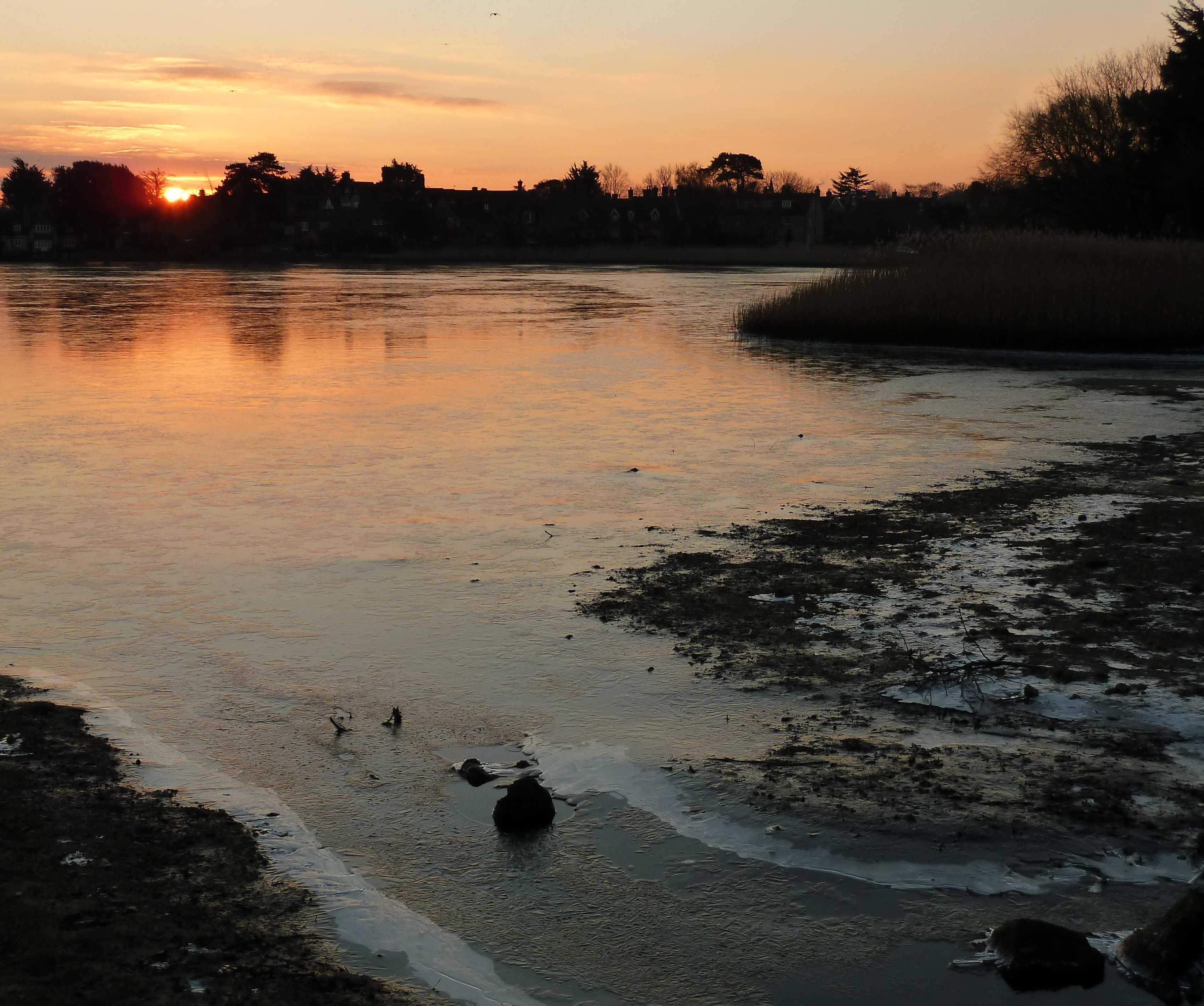 Beaulieu Mill Pond, New Forest, UK